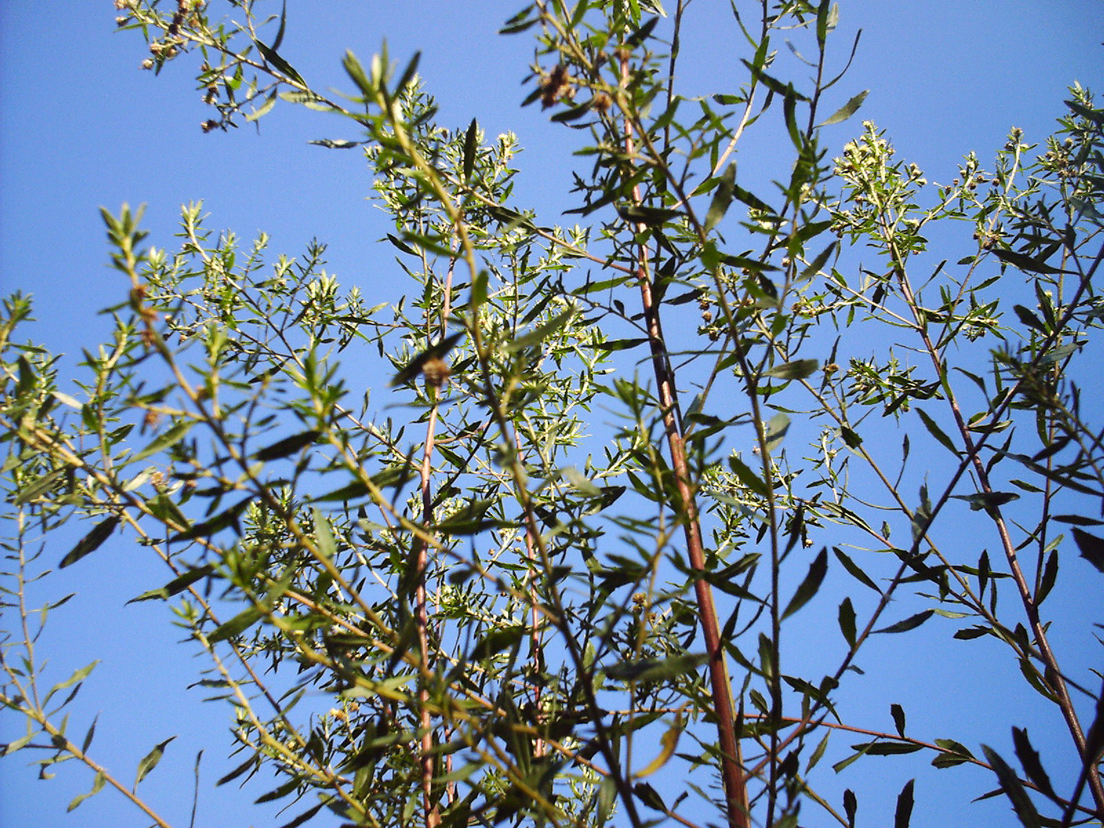 Baccharis dracunculifolia, alecrim-do-campo